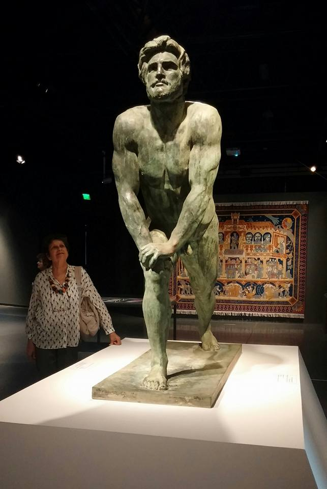 .חנוך הנריק גליצנשטיין, בר כוכבא , לראשונה הוצג בארץ ב1954 במוזיאון גליצנשטיין בצפת, לאחר סגירת המוזיאון הועבר למוזיאון עין חרוד. הוצג בתערוכת בר כוכבא במוזיאון "הארץ" 2016